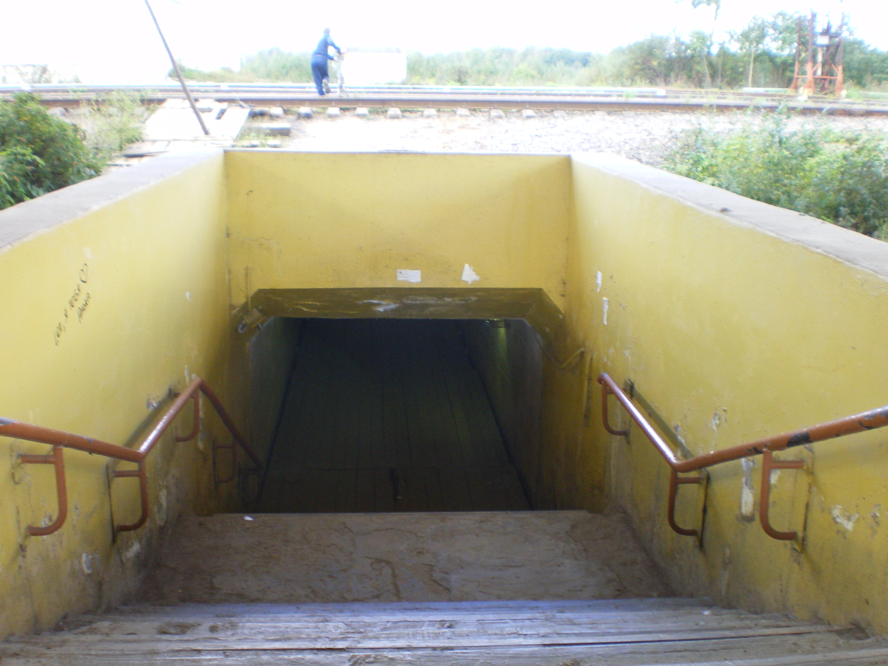 Все постройки станции: подземный переход.